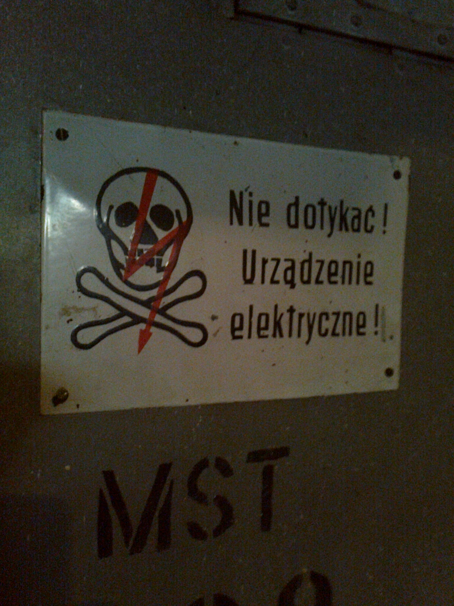 Tablica ostrzegawcza na MST.